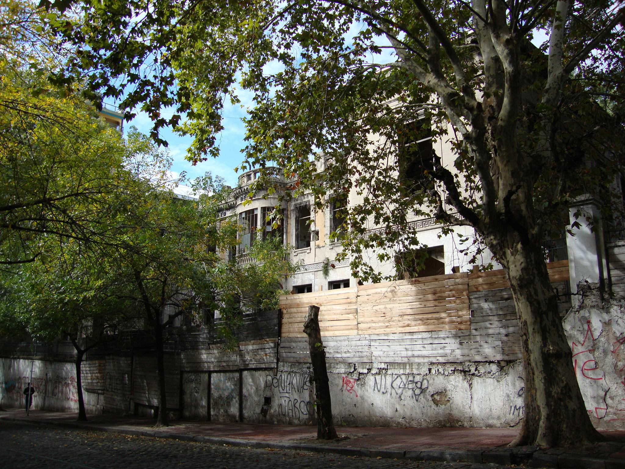 Vista del edificio del Hospital de Niños del Patronato de la Infancia, en la calle Humberto 1º entre Paseo Colón y Balcarce. Obra de Juan Antonio Buschiazzo. Abandonado desde 1970. Buenos Aires, Argentina.